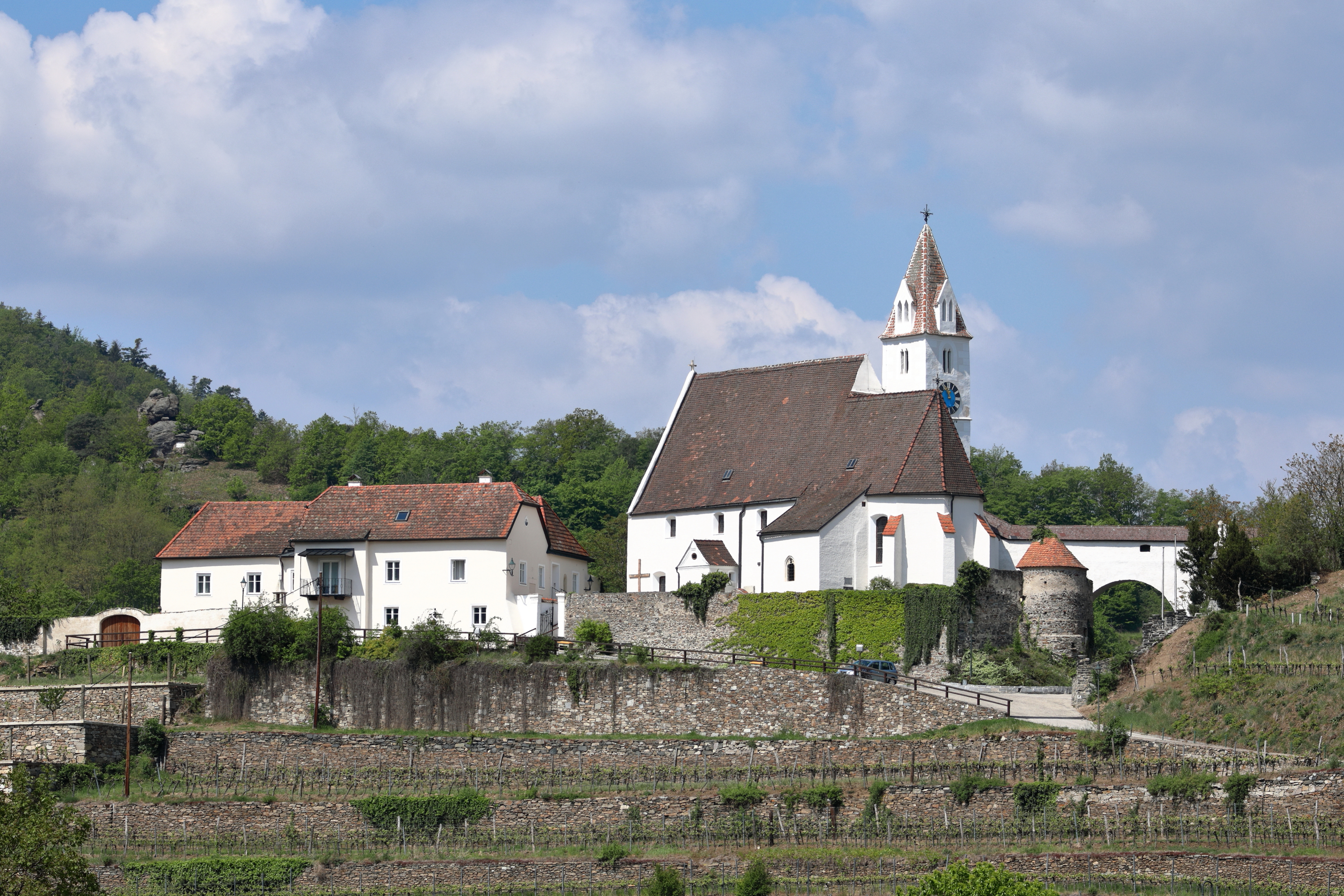 Ostsüdostansicht der röm.-kath. Pfarrkirche hl. Andreas in der niederösterreichischen Marktgemeinde Senftenberg. Die mittelalterliche Wehrkirche entstand in mehreren Bauphasen zwischen dem 12. Jahrhundert und der ersten Hälfte des 16. Jahrhunderts. Der Pfarrhof ist tw. im Kern aus dem 16. Jahrhundert. Im 18. Jahrhundert, 1905 und 1966 wurde er umgebaut bzw. erweitert.